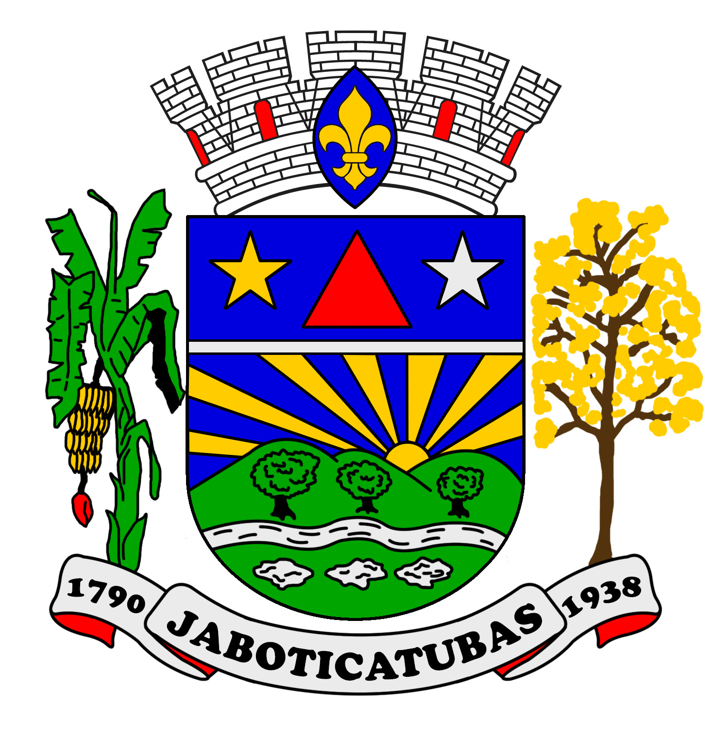 Bandeira do município de Jaboticatubas, Minas Gerais, Brasil.